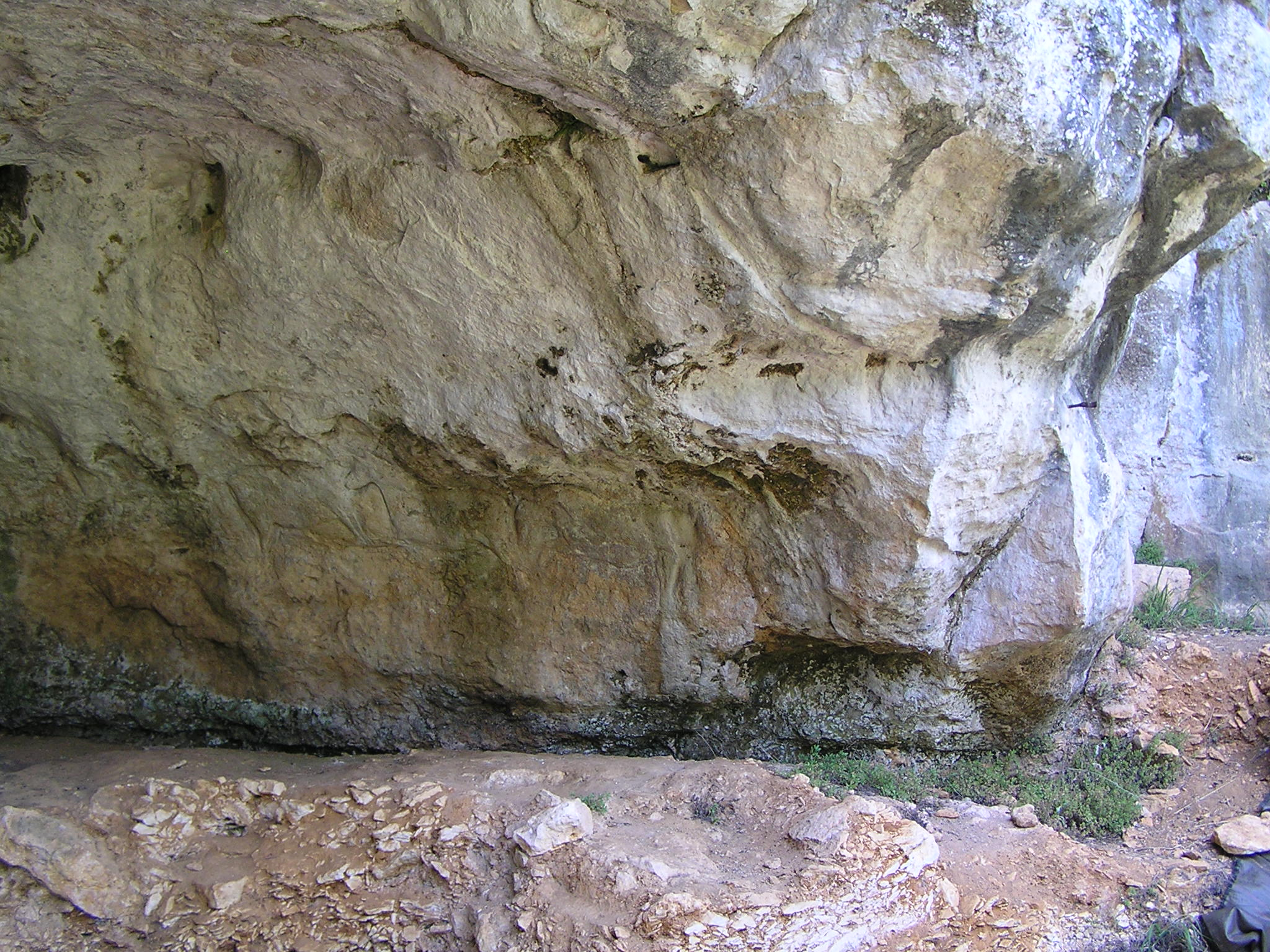 frise de chevaux de la chaire à Calvin à Mouthiers-sur-Boëme, Charente, France